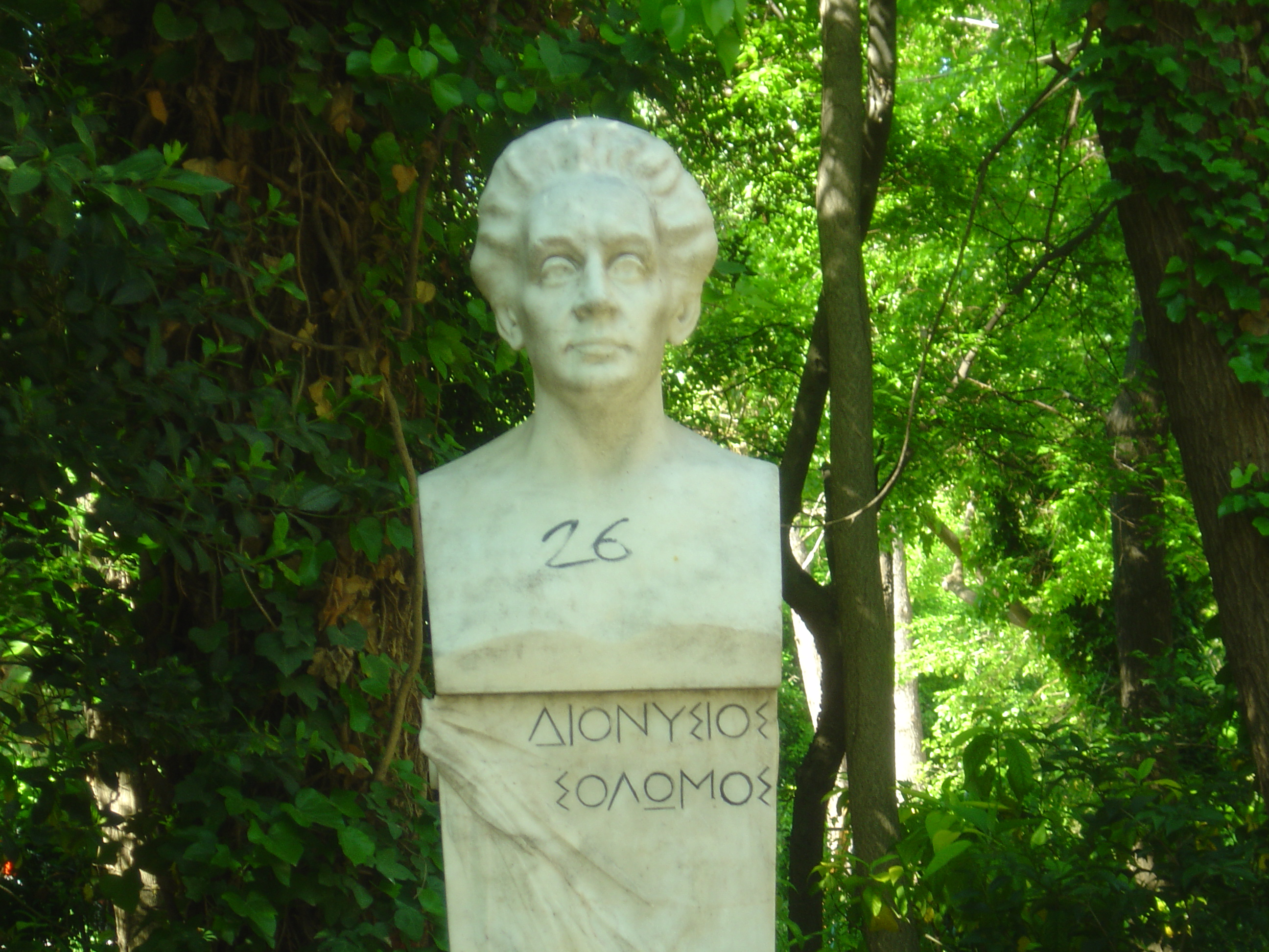 Διονύσιος Σολωμός. Έργο του Θωμά Θωμόπουλου (1881 - 1938), Αθήνα - Εθνικός Κήπος.